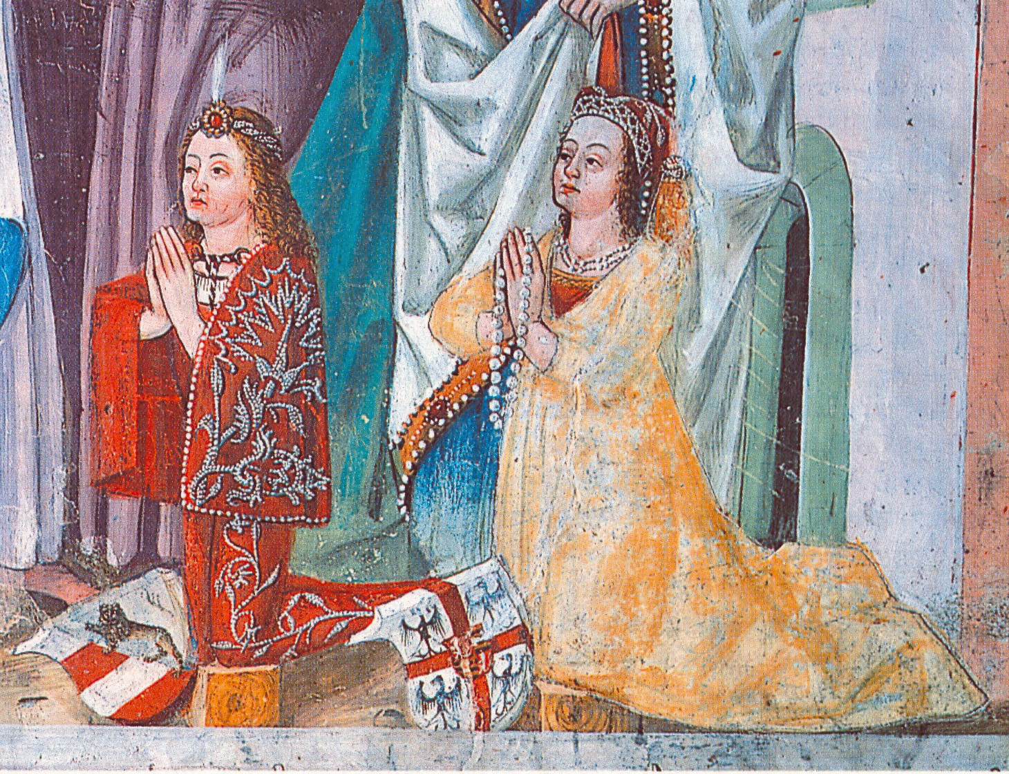 Graf Leonhard von Görz und seine Frau Paula Gonzaga Fresko in der Kapelle von Schloß Bruck, Lienz